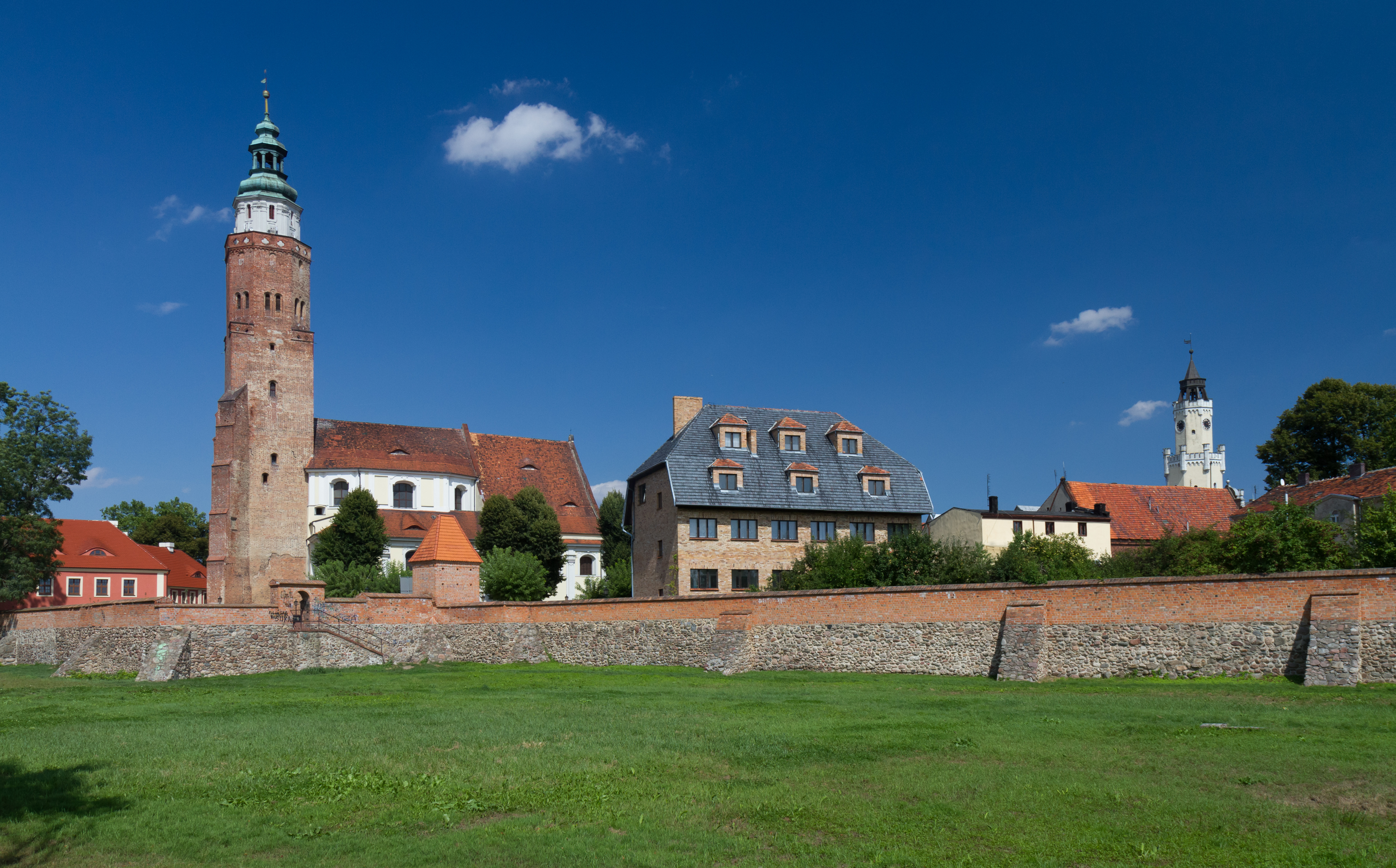 Wschowa, mury obronne (pozostałości), XIV, XVI